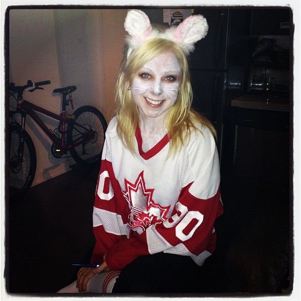 Puck Bunny!